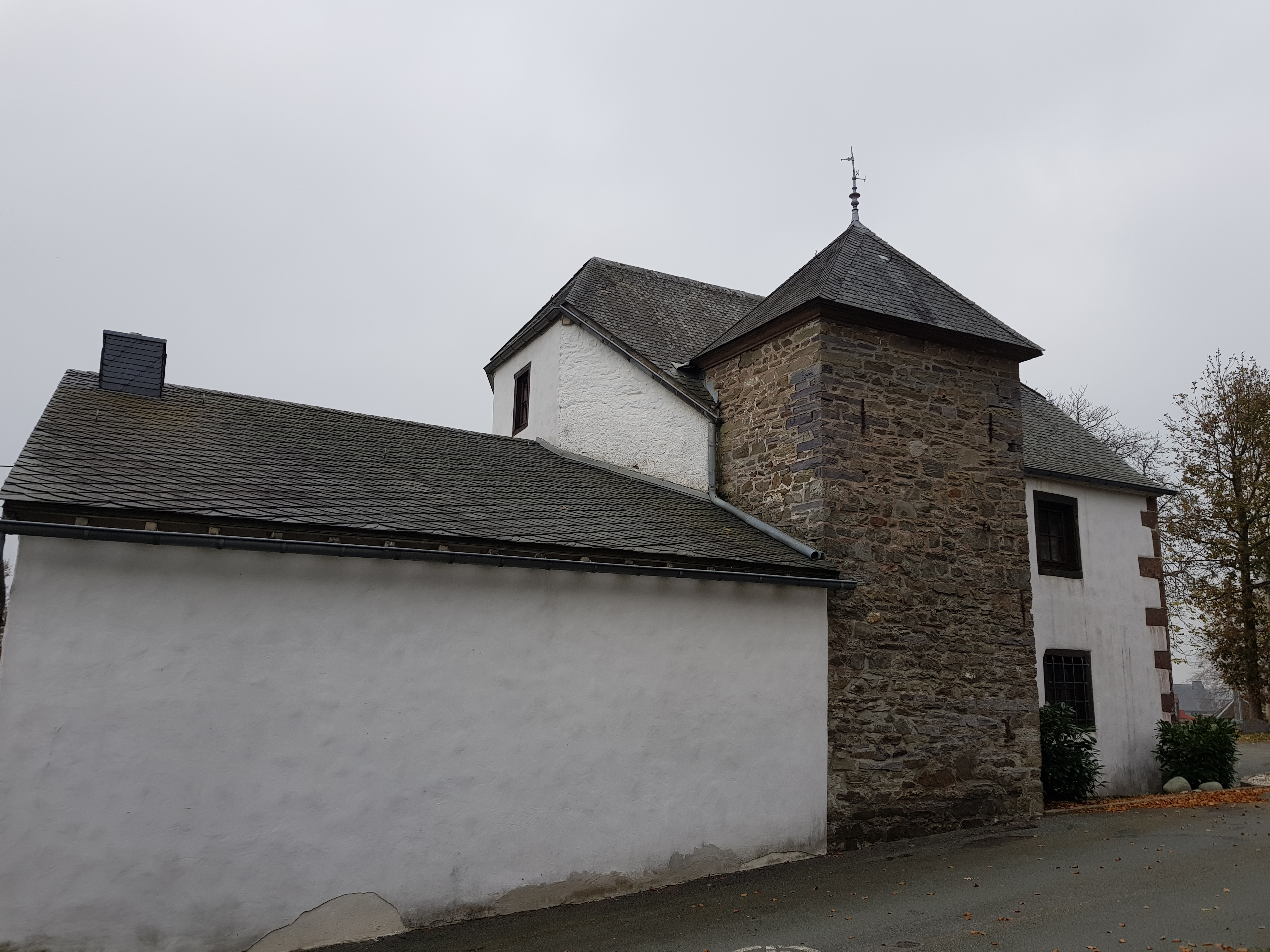 Antoniushäuschen, Amel, Belgien This photo of immovable heritage has been taken in the Walloon Region